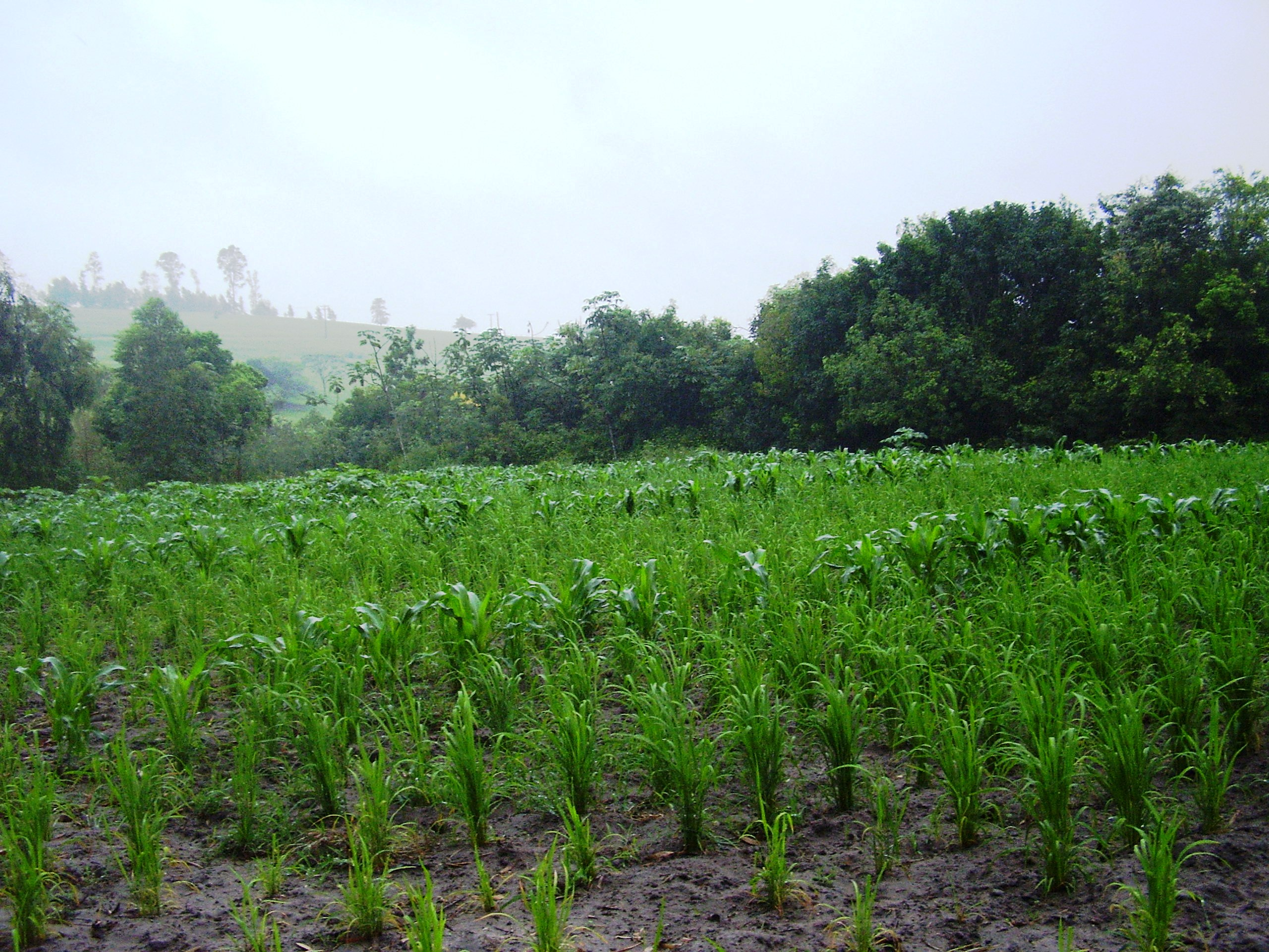 roça de aroz São Pedro do turvo SP